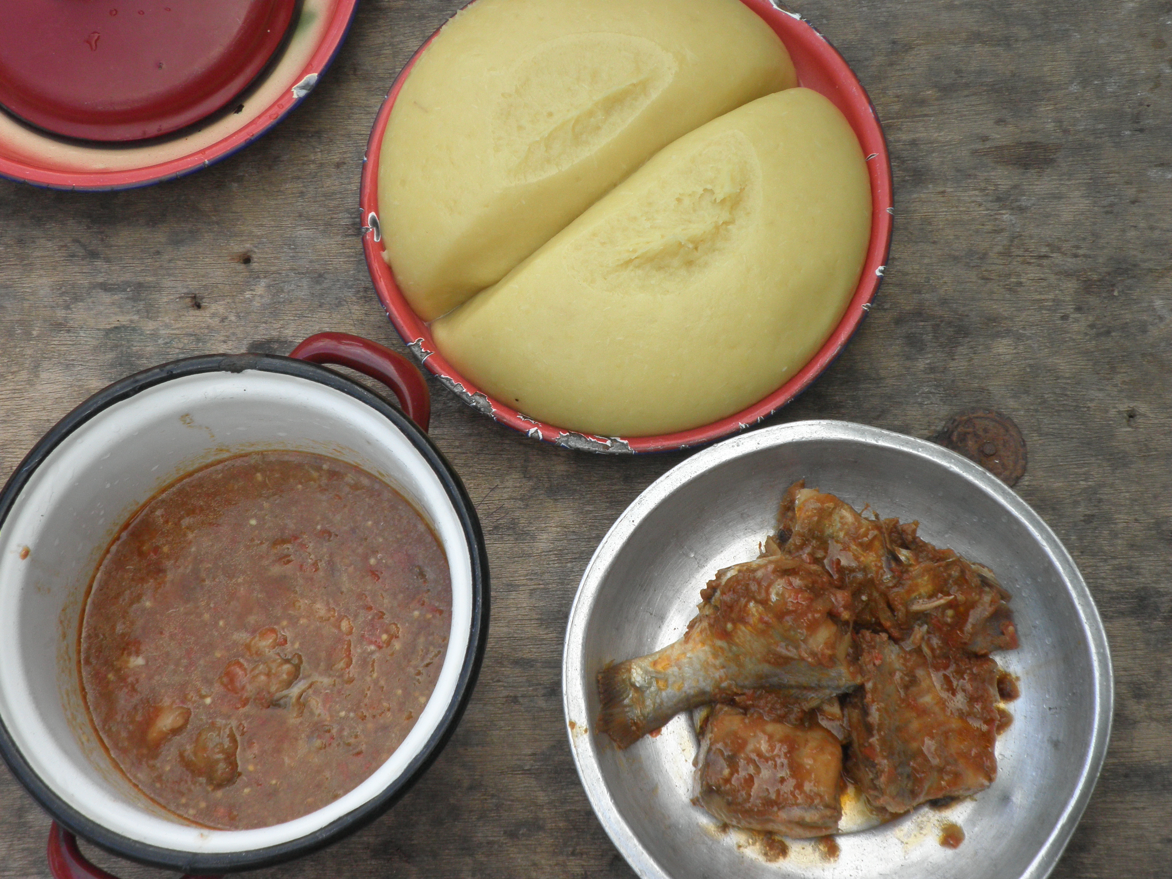 Foutou de bananes et Biokesseu au poisson